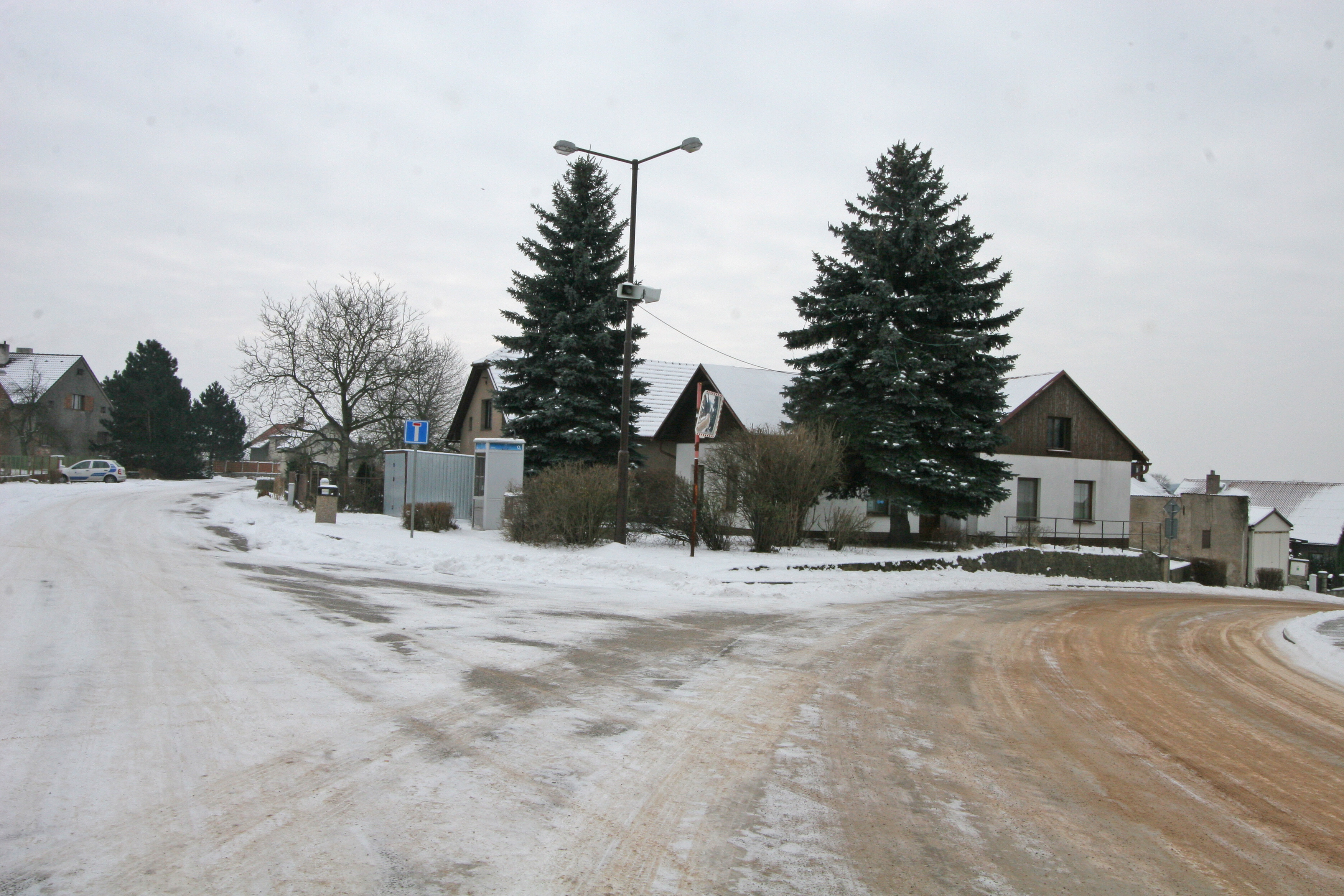 Osičky obecní úřad